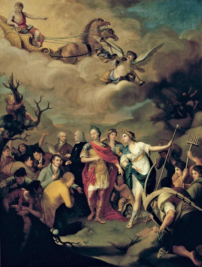 La obra representa al rey Carlos III de España (1716-1788), entregando sus nuevas tierras a los colonos de Sierra Morena.